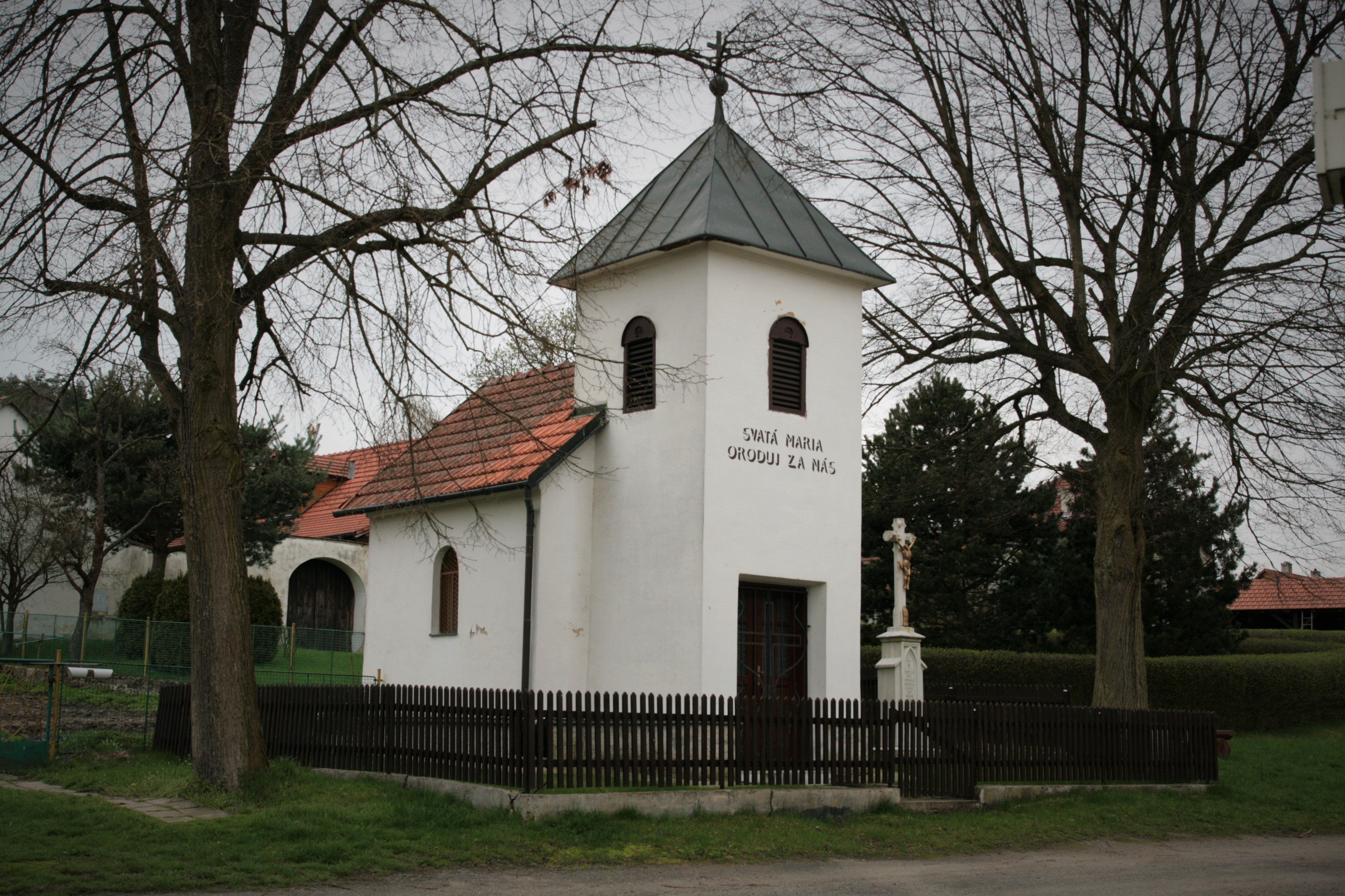 Vesnice Maňová, část obce Pernštejnské Jestřabí v okrese Brno-venkov. Kaple Panny Marie Bolestné na návsi.